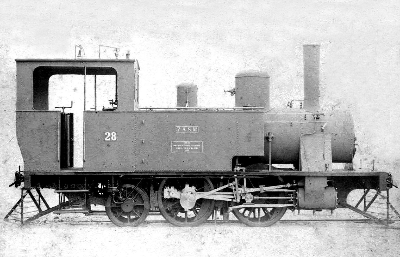 NZASM 19 Tonner 0-4-2T no. 28